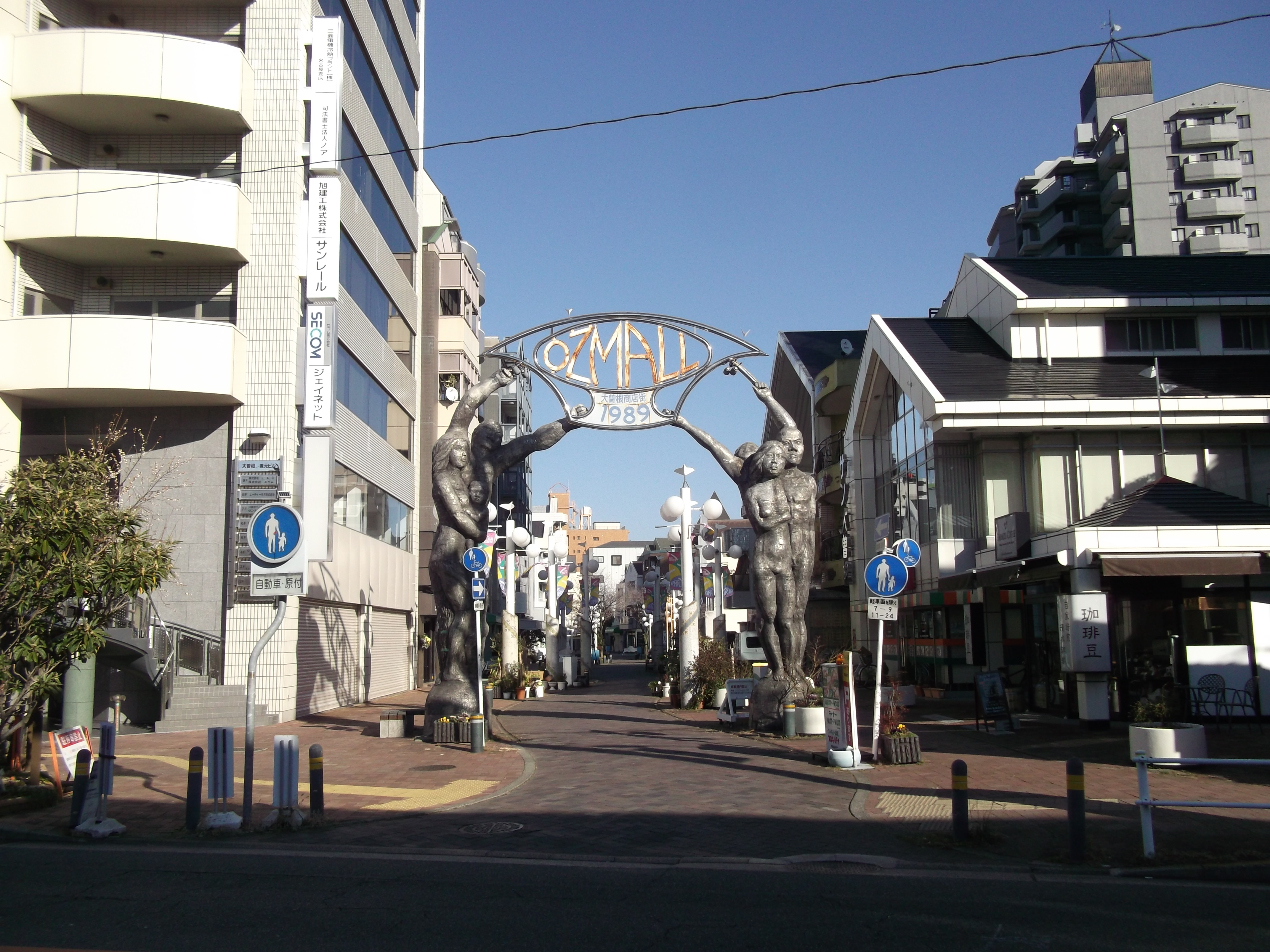 名古屋市北区のOZモールの西端を撮影。